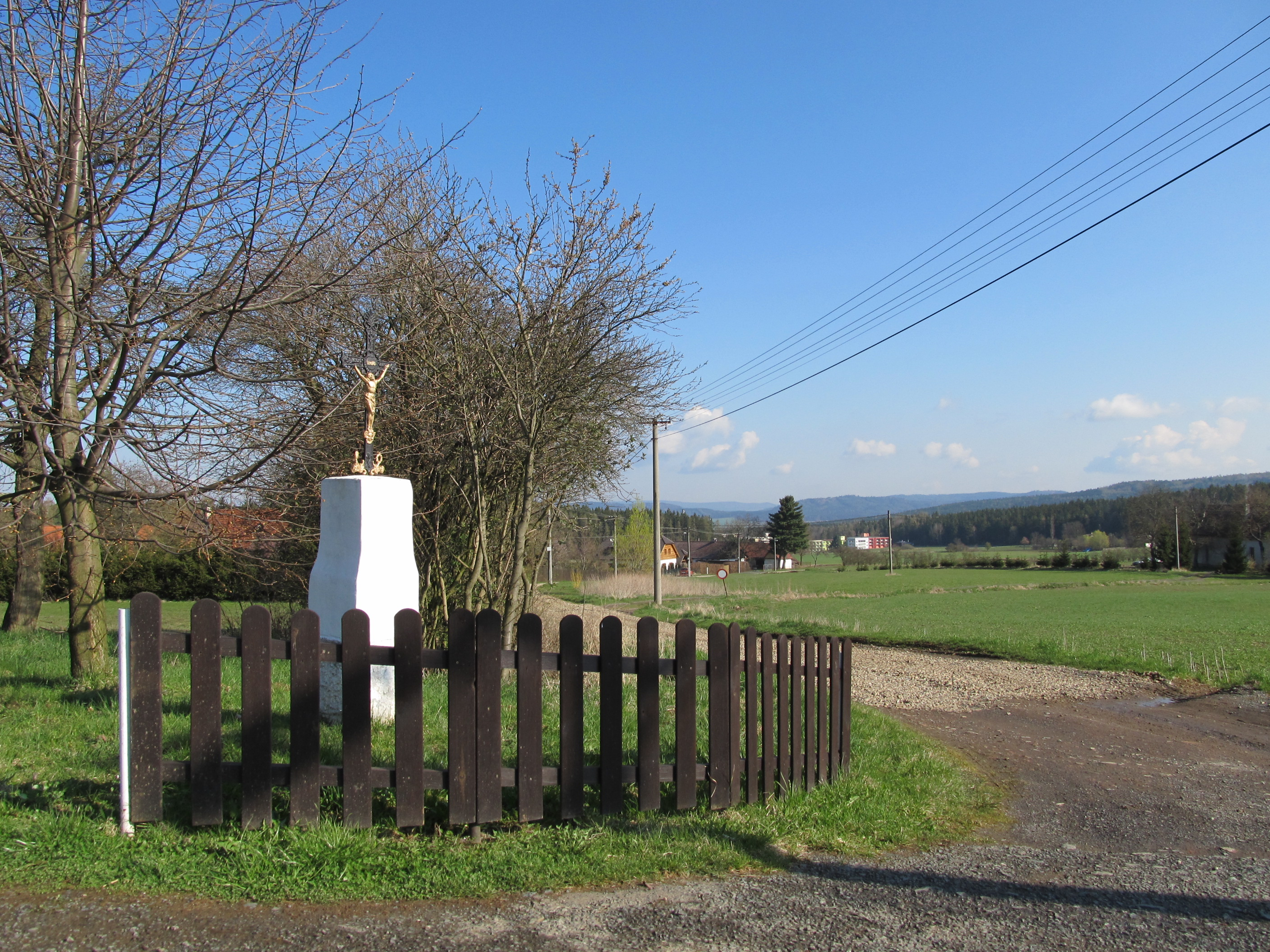 Myť u Mirošova